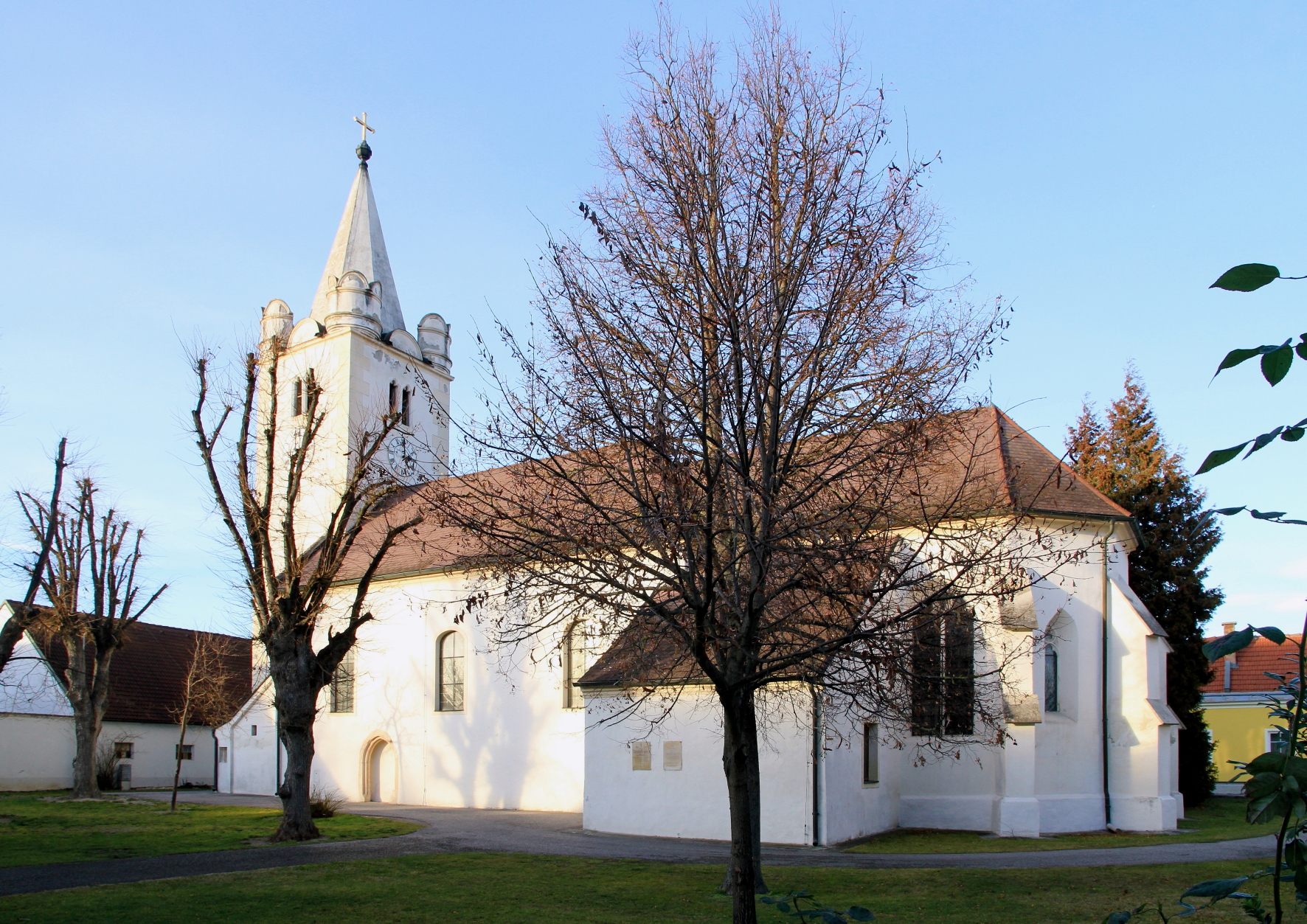 Katholische Pfarrkirche hl. Martin in Stollhofen, ein Ortsteil der niederösterreichischen Stadt Traismauer.